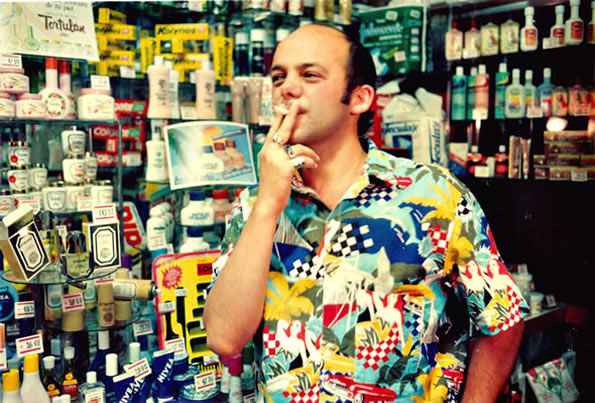 Retrato de Marcelo Pombo, fotografía de Alberto Goldenstein, 1990